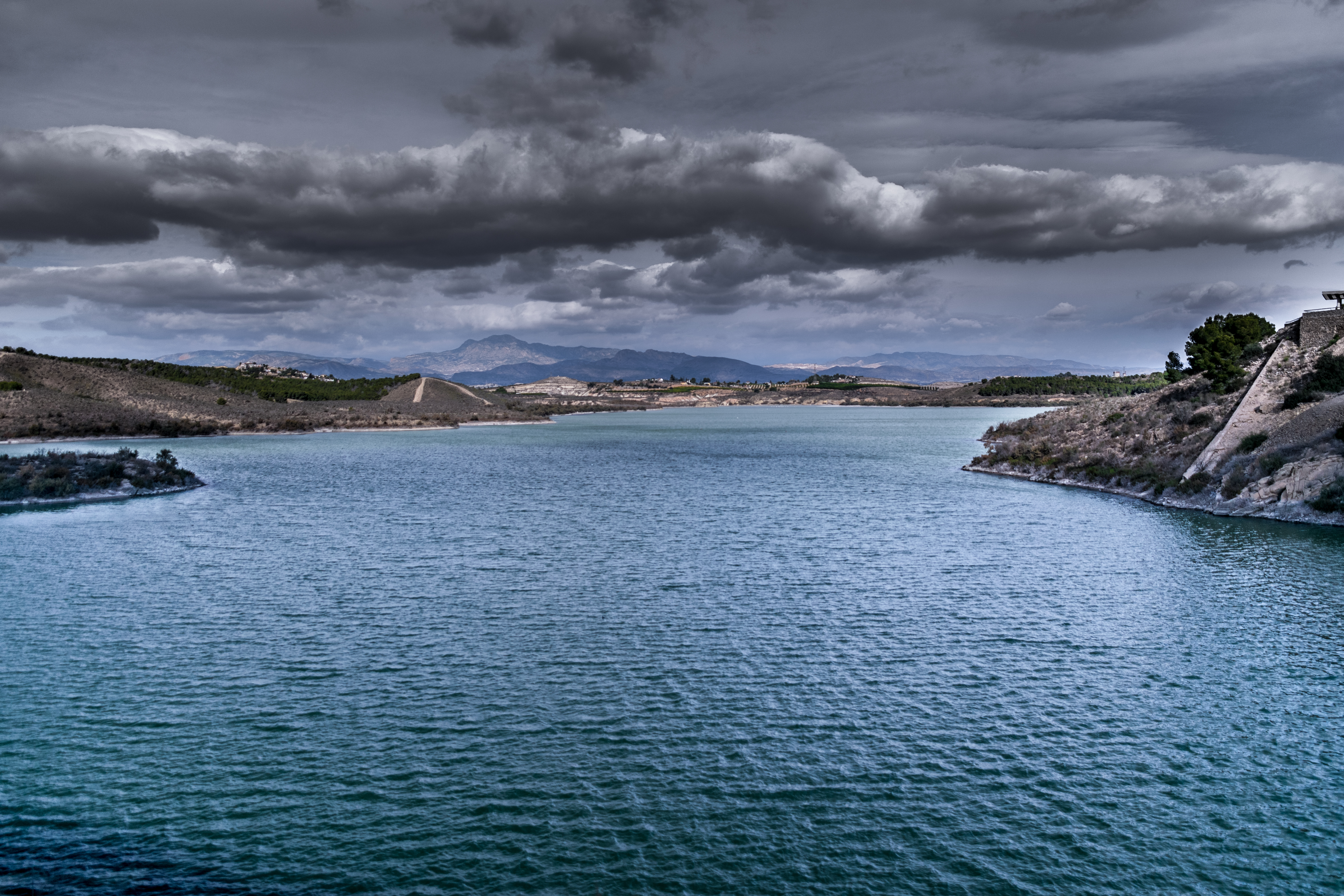 Humedal del Ajauque y Rambla Salada This is a photography of a Site of Community Importance in Spain with the ID: ES6200005. Natura2000 entry, EEA entry